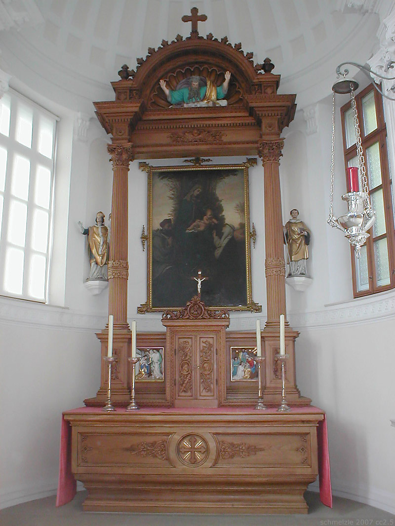 Altar der Schlosskapelle in Schwaigern, Baden-Württemberg, Deutschland